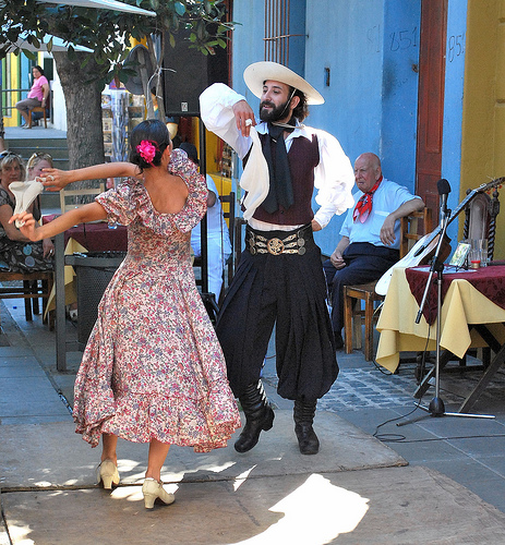 Argentina couple dancing Zamba